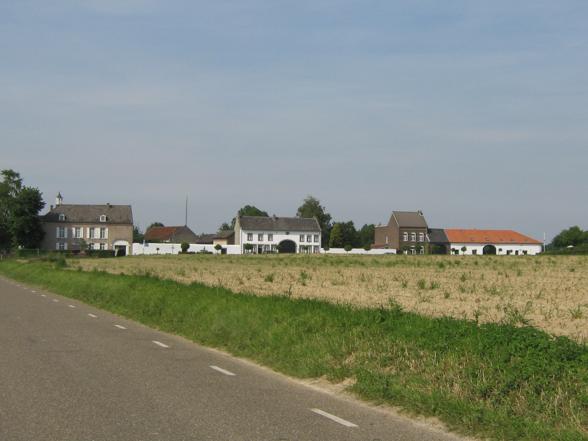 Komende vanuit 't Rooth ('t Roeët) zicht op Gasthuis ('t Gastes). , gemeente Mergraten, NL